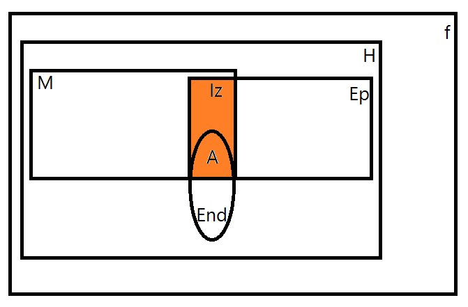 Relacje morfizmów